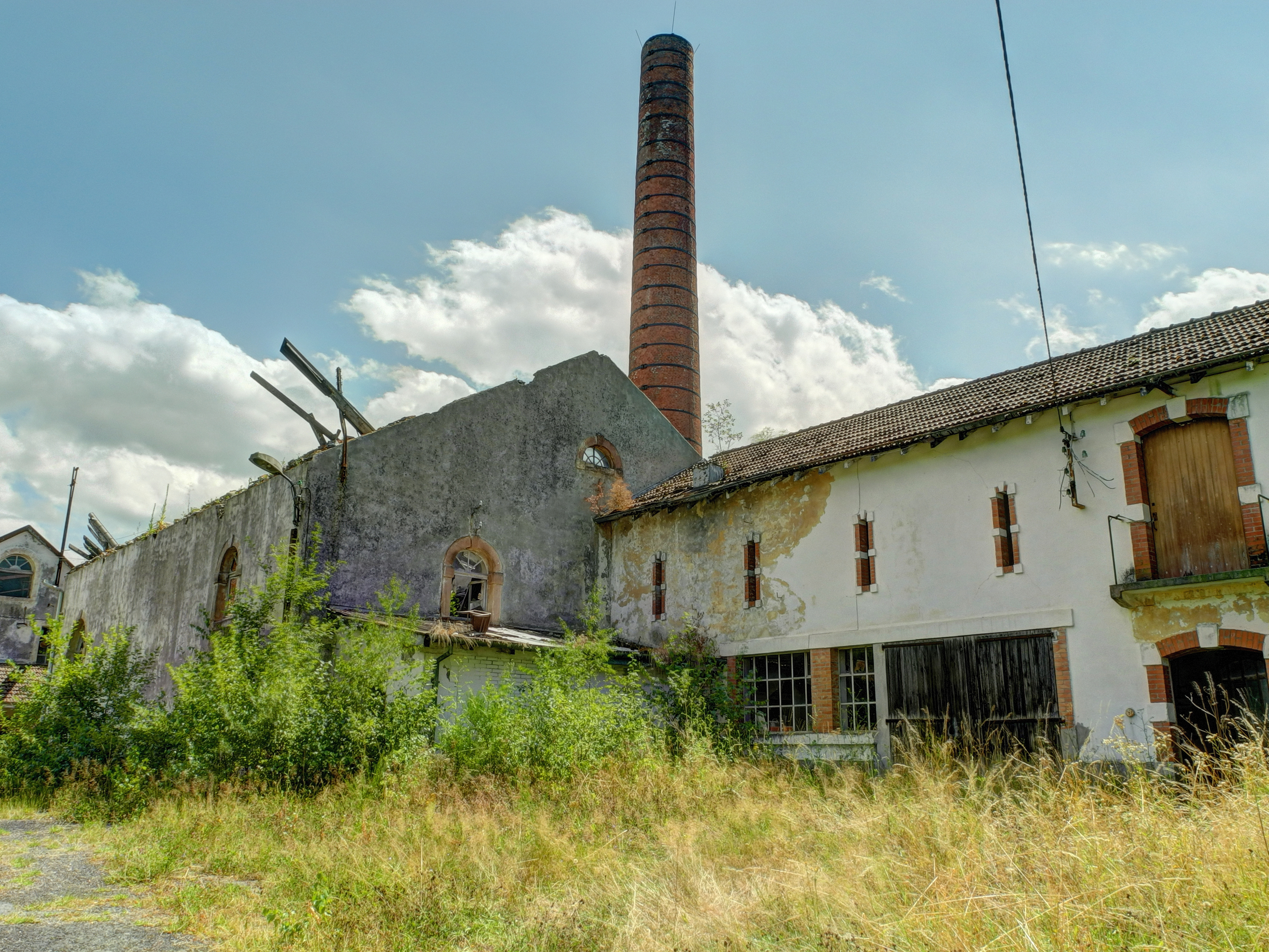 Usine Walter-Seitz de Granges-sur-Vologne : à l'intérieur (HDR).